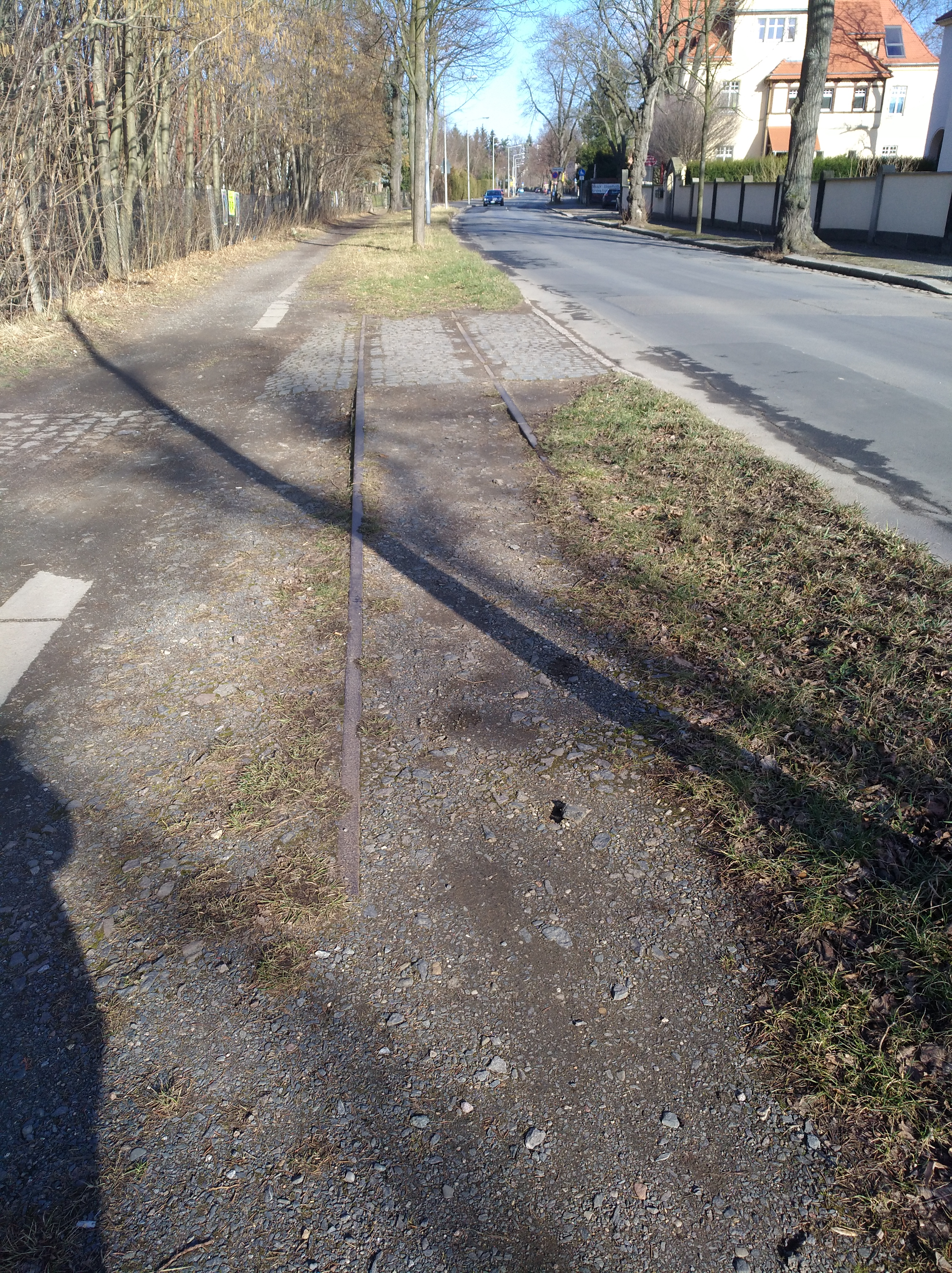 Gleisrest der ehemaligen Lockwitztalbahn im Stadtteil Lockwitz, Gleisrest eigener Bahnkörper Lockwitztalstraße